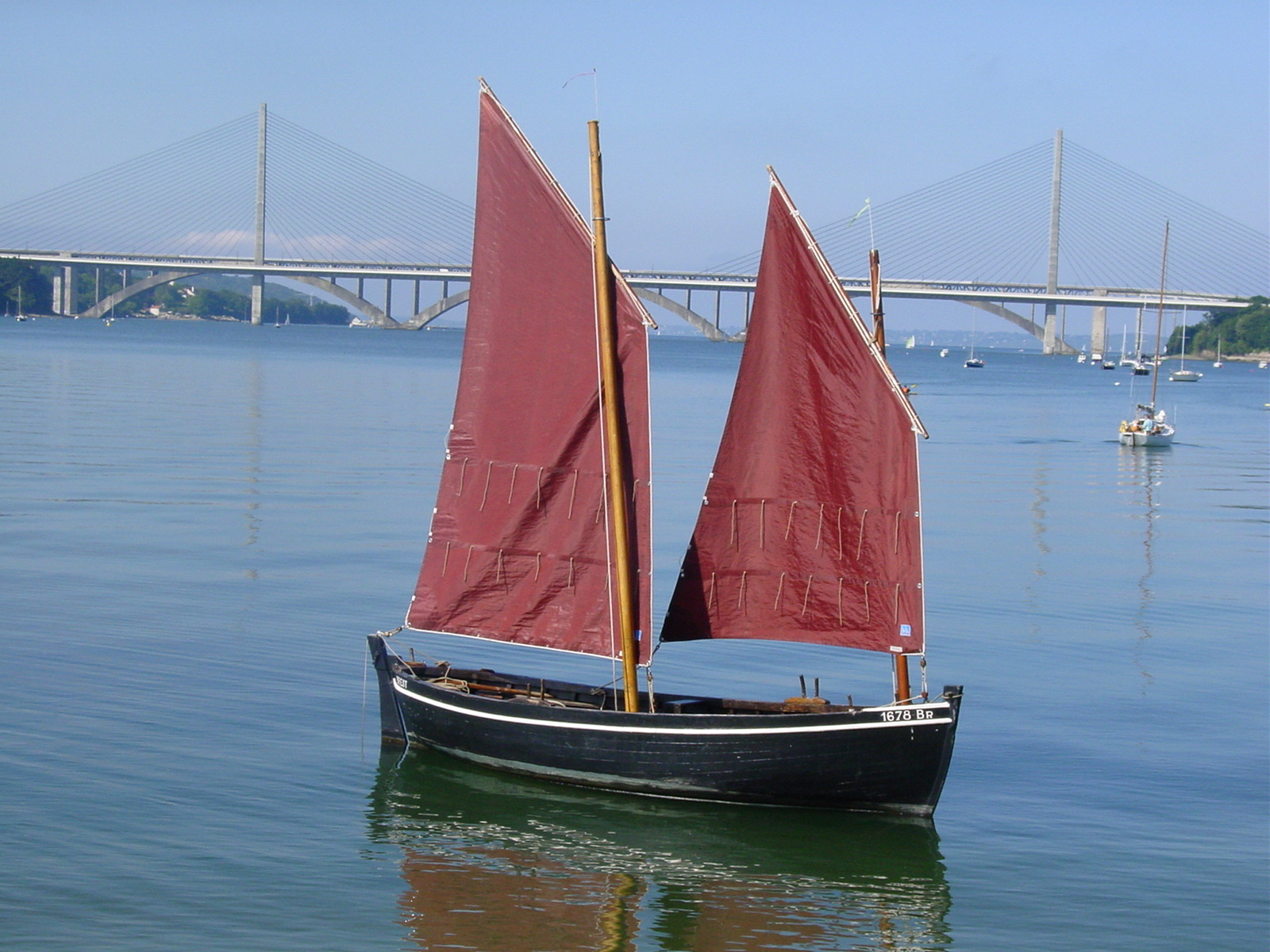 Chaloupe Mari-Lizig sur l'Elorn avec en arrière plan les ponts de l'Iroise et Albert Louppe